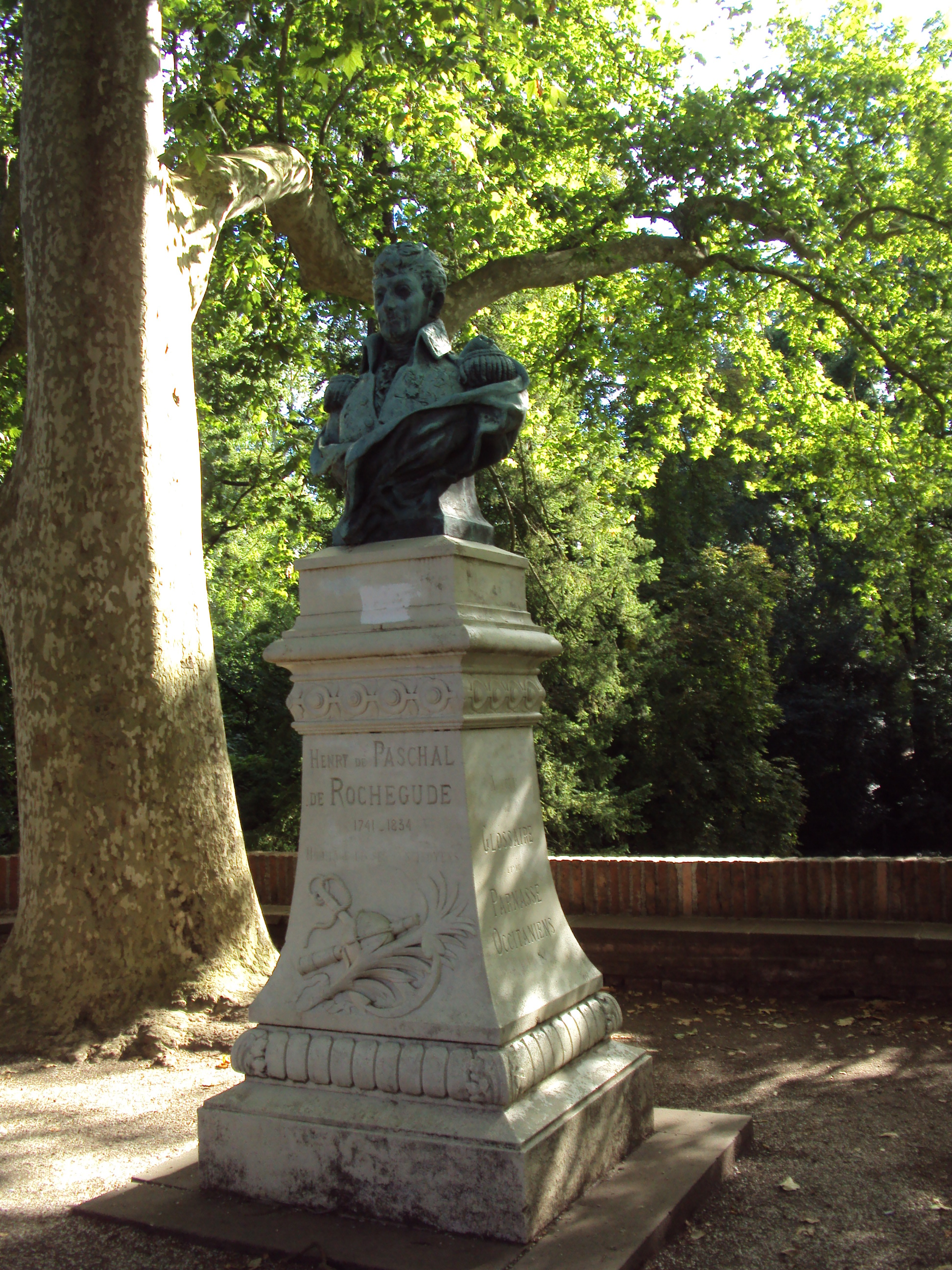 Statue de Rochegude dans le parc éponyme